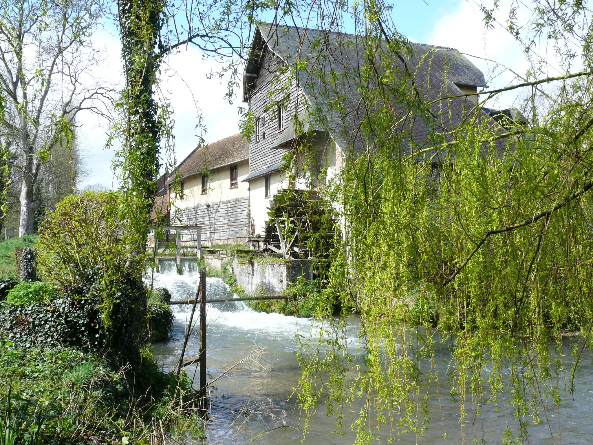 Moulin de Frémontiers (Somme), sur le ruisseau des Évoissons